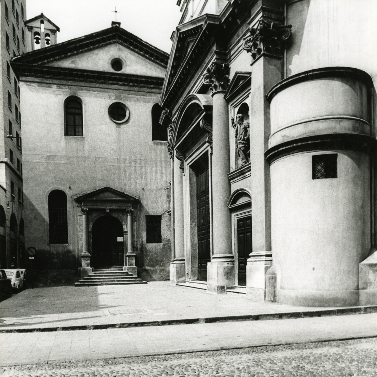 Servizio fotografico : Padova, 1967 / Paolo Monti. - Stampe: 3 : Positivo b/n, gelatina bromuro d'argento/ carta, 24x30. - ((Al verso delle stampe iscrizioni didascaliche manoscritte a matita; timbro a inchiostro con copyright: "© - Credit to:/ Paolo Monti/ Via T. Tasso [...]/ Milano [...]". - Sul coperchio della scatola iscrizione didascalica manoscritta a pennarello nero: "Emilia/ Ferrara, Padova". - Occasione: Documentazione per la pubblicazione: Diego Valeri (a cura di), "Padova: i secoli, le ore", Bologna, Edizioni Alfa, 1967. - Fonte: Monografia di Valeri Diego (a cura di): Padova: i secoli, le ore, Bologna, Edizioni Alfa (1967). - Fonte: Agenda di Paolo Monti: Monti/ 3 aprile 1966 - 9 marzo 1971/ 12421-16823 (1966-1971), presso Archivio Paolo Monti